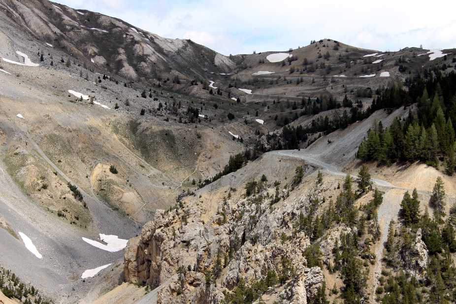 Dernier passage avant le Col d'Izoard